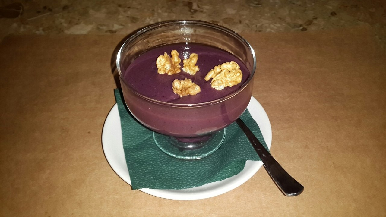 Пеламуши - десерт грузинской кухни